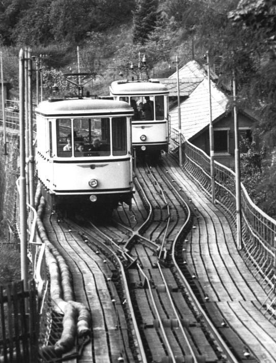 Dresden, Standseilbahn ADN-ZB Hiekel 27.9.1985 Dresden: 90 Jahre alt wird dieser Tage die Dresdner Standseilbahn. Die älteste Bahn dieser Art in der DDR befördert jährlich 1,5 Millionen Fahrgäste zwischen den Stadtteilen Loschwitz und Weißer Hirsch. Auf einer Strecke von 544 Metern überwindet die Bahn einen Höhenunterschied von 95 Metern. Im Unterschied zu freischwebenden Bahnen wird hier die Kabine durch Seile auf Schienen fortbewegt. -siehe auch 1985-0927-6N